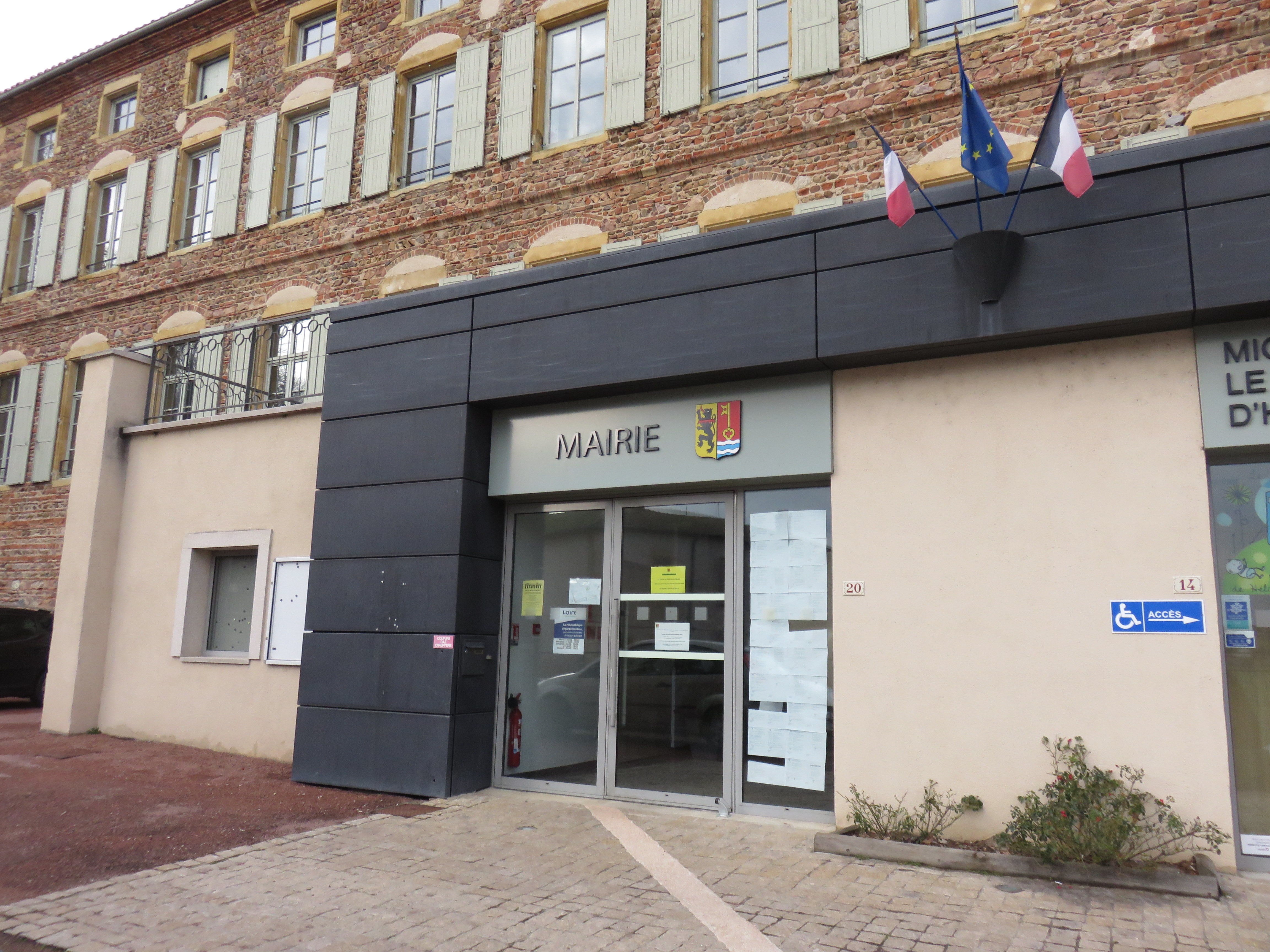 Mairie de Perreux (Loire, France) en février 2018.